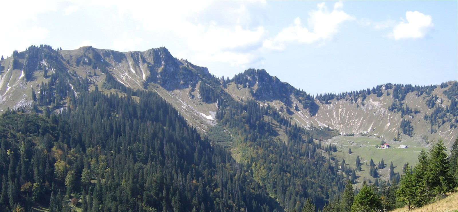 Bodenschneid, rechts das Bodenschneidhaus